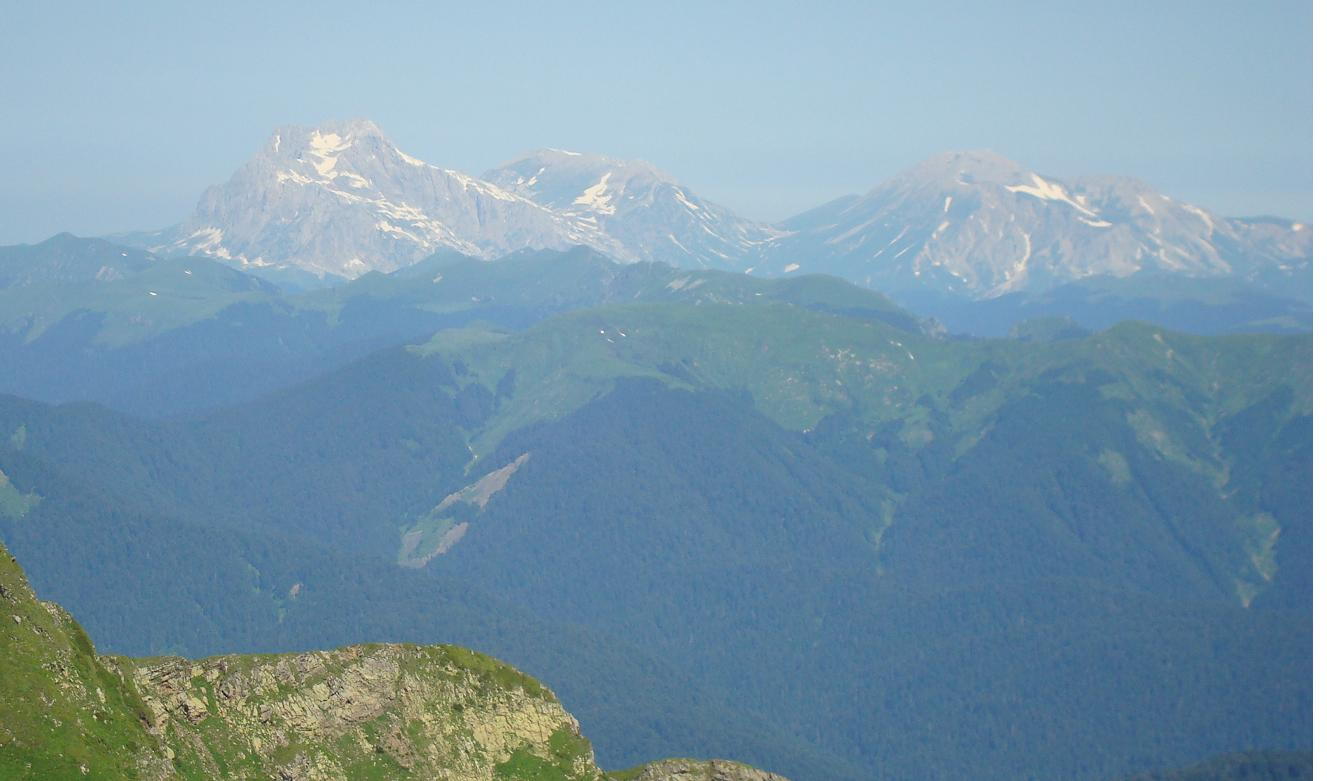 Вид на гору Фишт с вершины Ачишхо летом